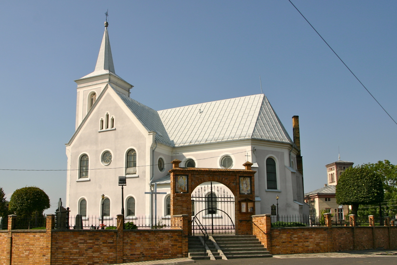 Twardawa – wies w Polsce położony w województwie opolskim, w powiecie prudnickim, w gminie Głogówek.